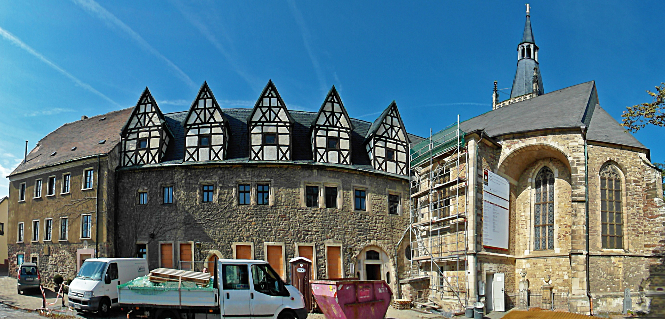 St. Annen-Kirche Eisleben & ehemaliges Augustiner-Eremiten-Kloster